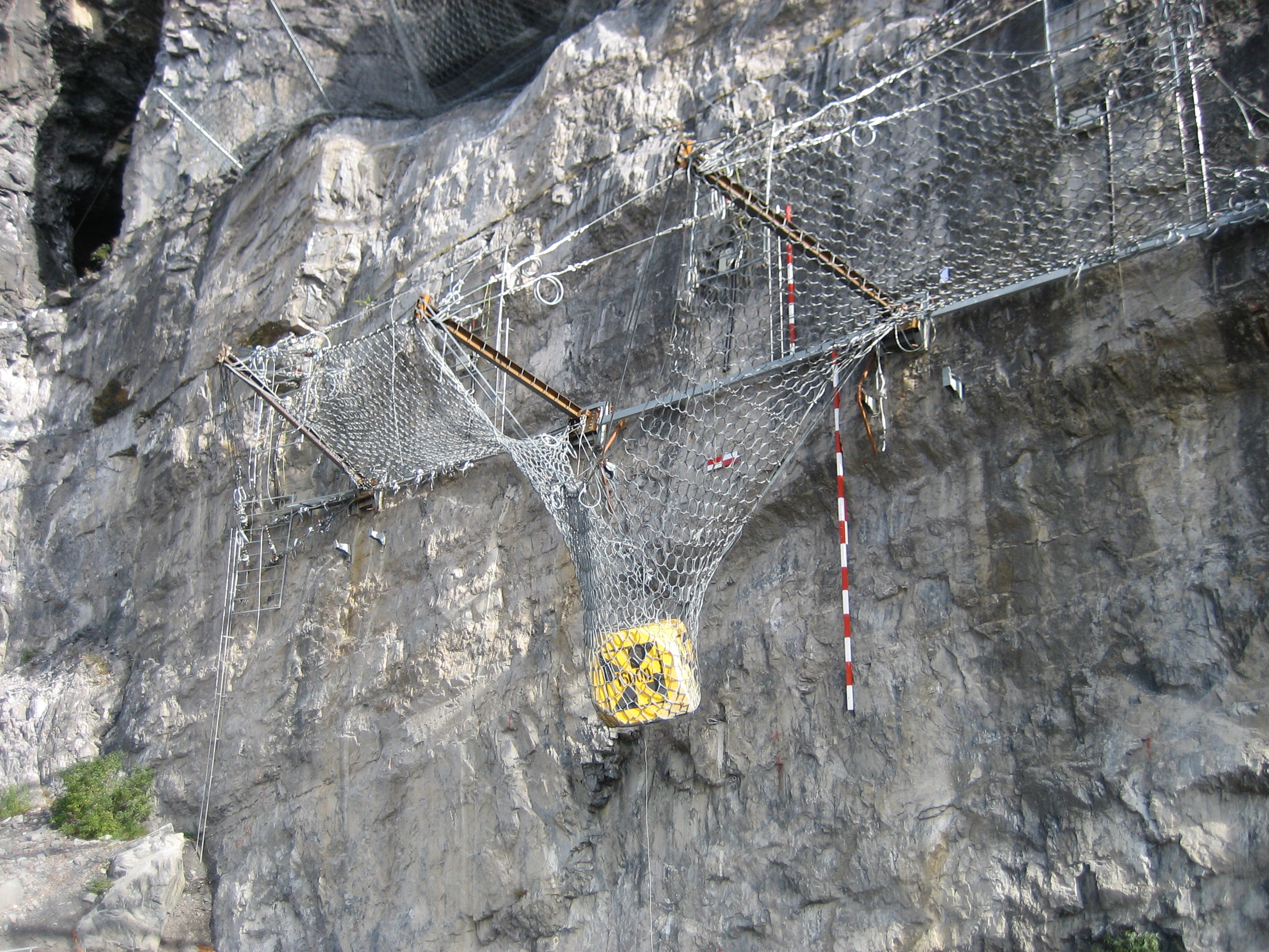 Bariera odłamkowa na 5000 kJ. Rozwiązanie firmy Geobrugg AG.